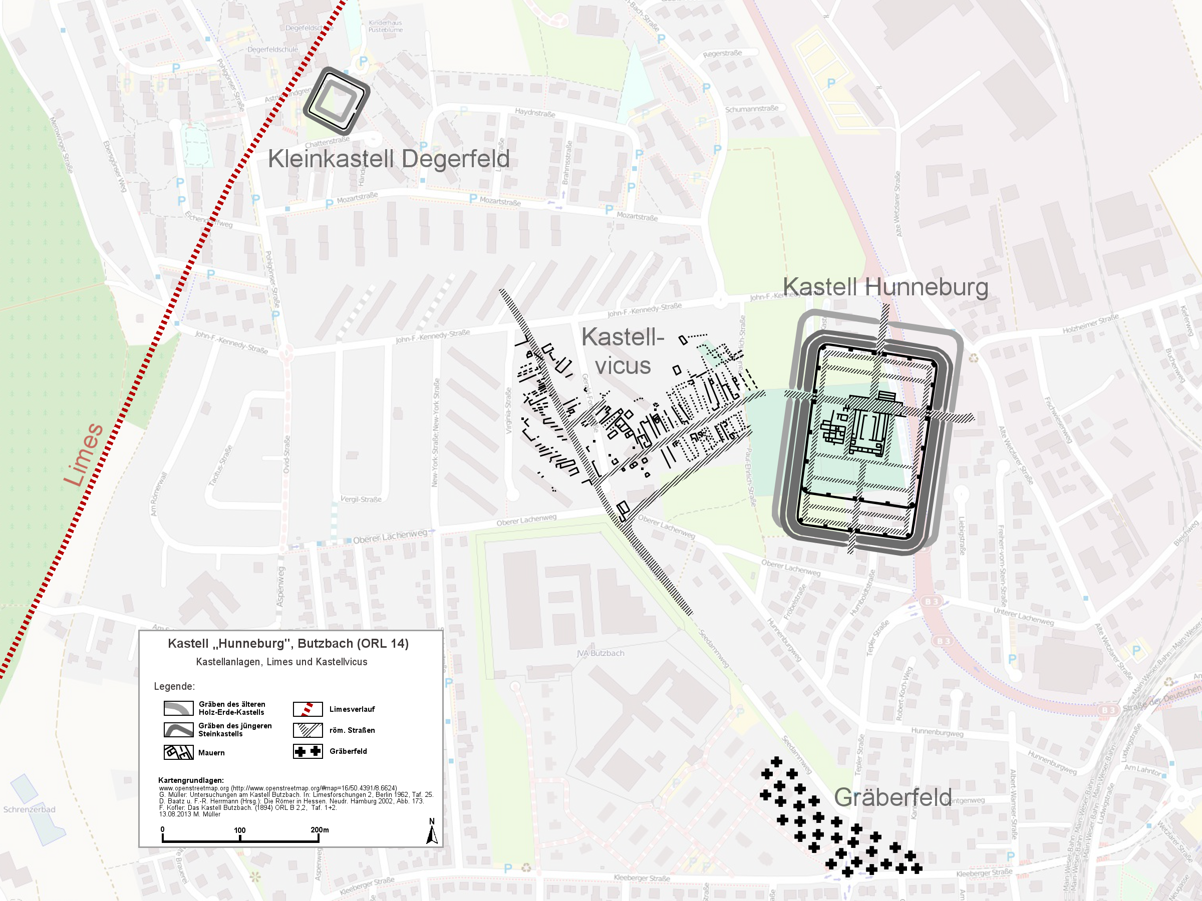 Lageplan des römischen Kastell Butzbach, Wetteraukreis, Hessen.